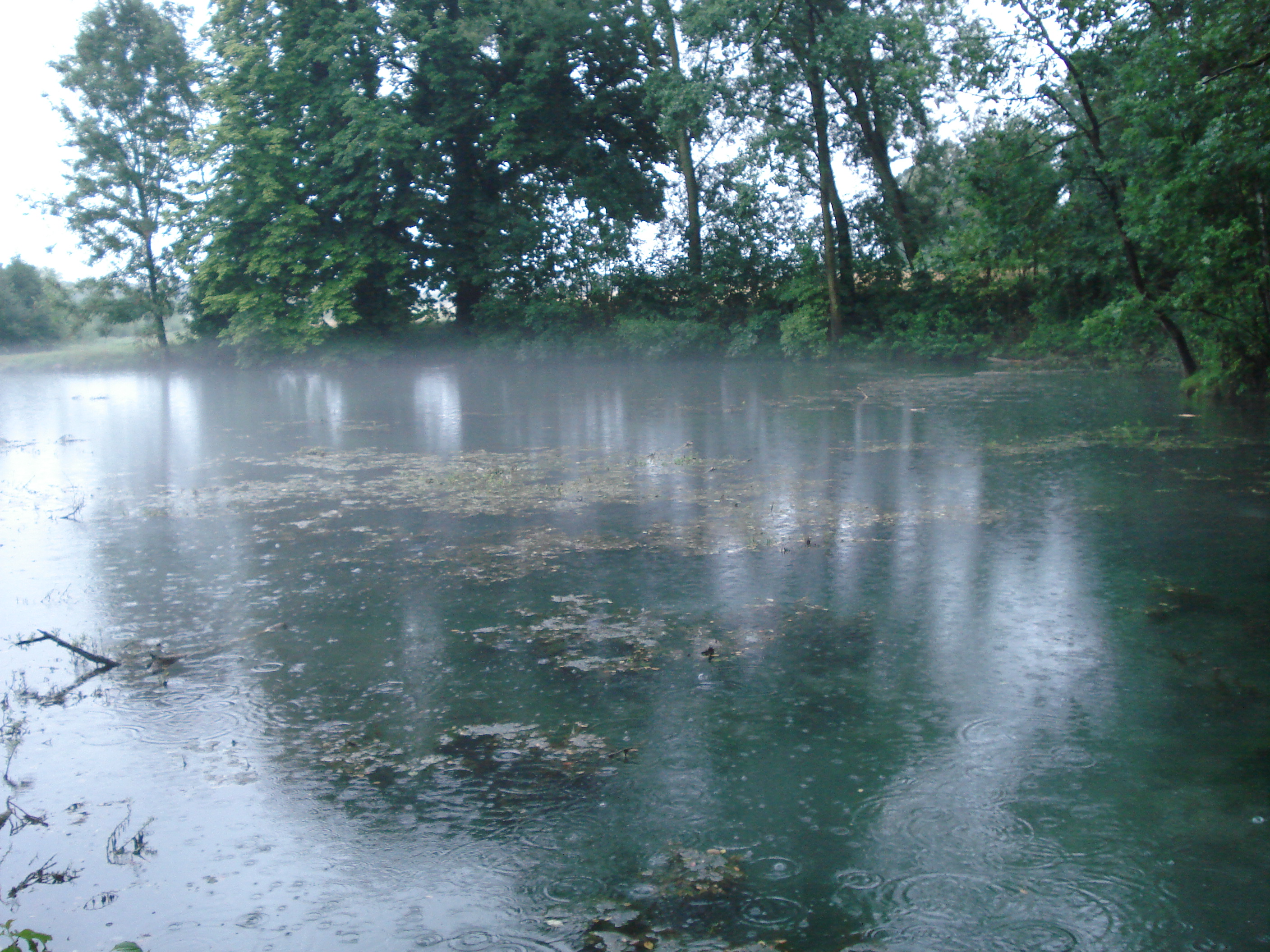 Der Quellteich in Kösching